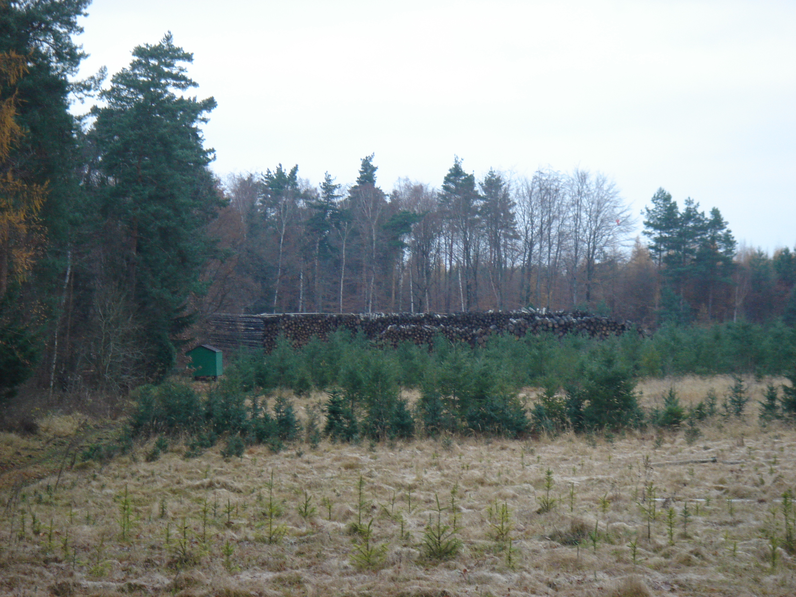 auf dem Gelände der Forstbaumschule in der Dresdner Heide